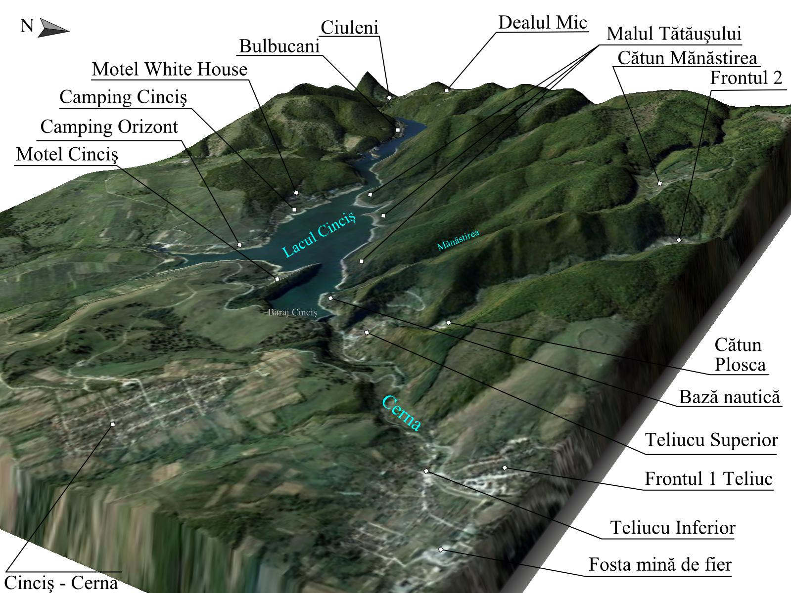 Prelucrare 3D pentru Cincis - Cerna si Lacul Cincis, Hunedoara.